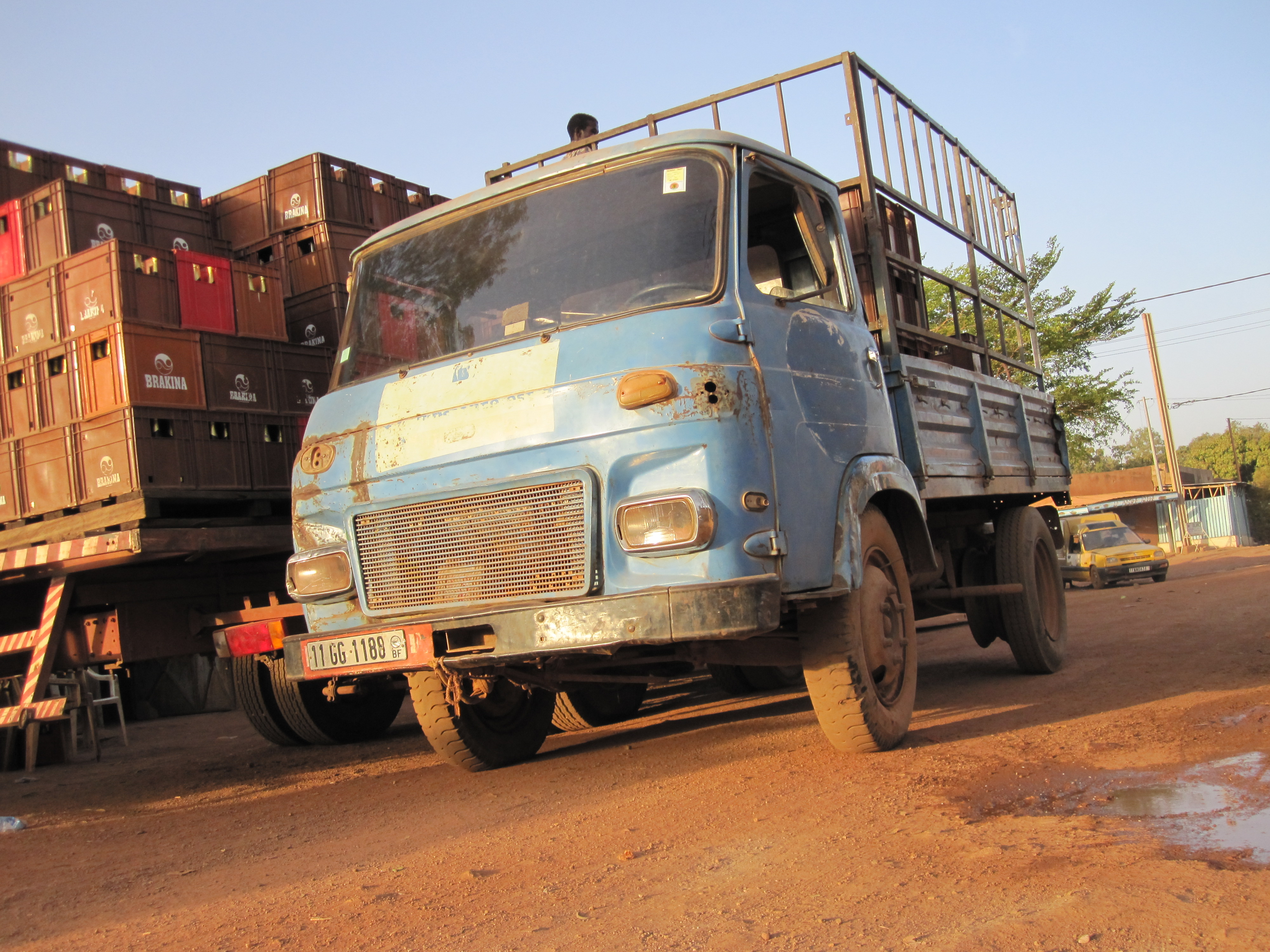 Saviem SG4 utilisée pour le transport de boissons à Ouagadougou (Burkina Faso)